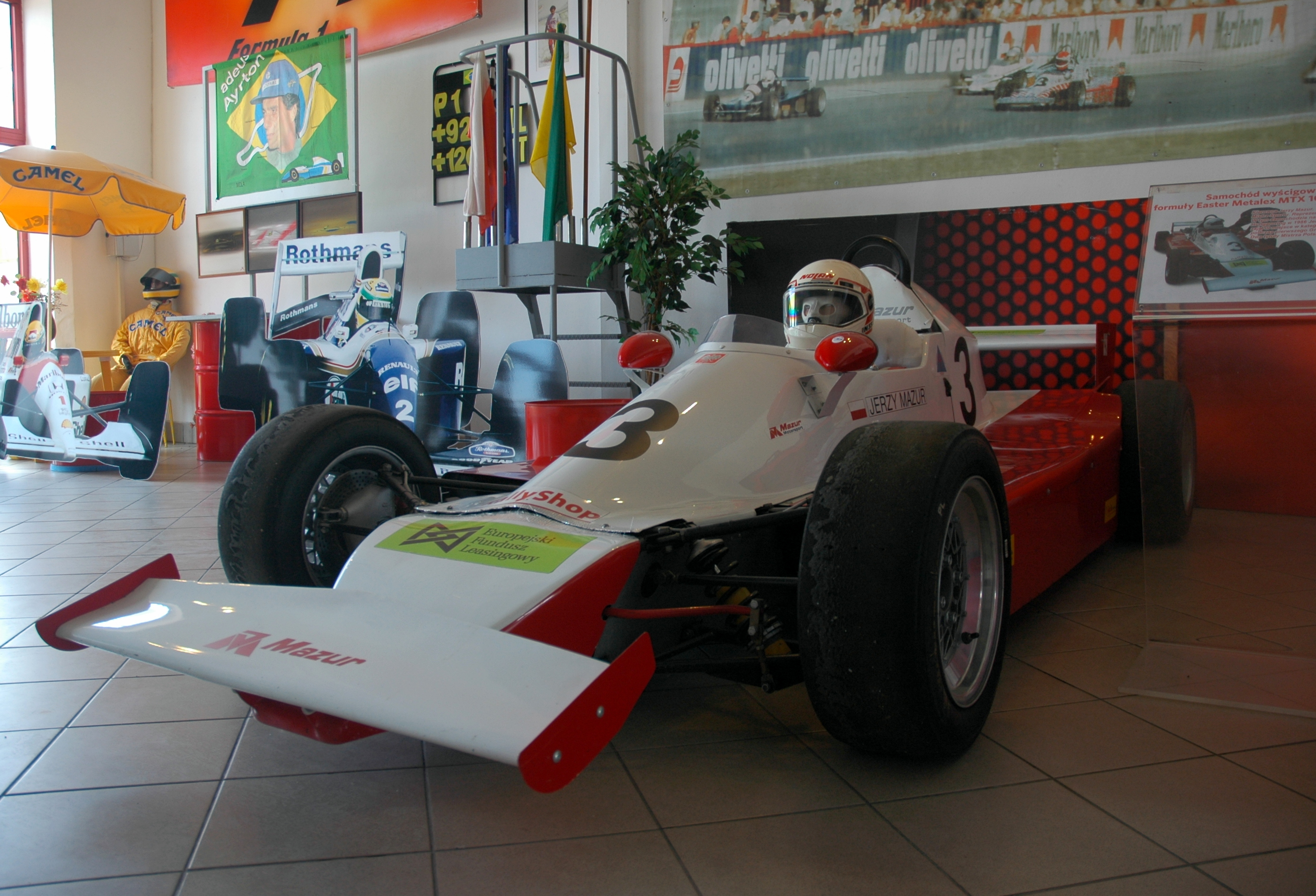 Muzeum Górnictwa i Sportów Motorowych w Wałbrzychu. Samochód wyścigowy formuły Easter Metalex MTX 106 z 1983 roku. W tym samochodzie Jerzy Mazur na torze Hungaroring w 1986 roku zajął 3 miejsce w kategorii formuły Easter.